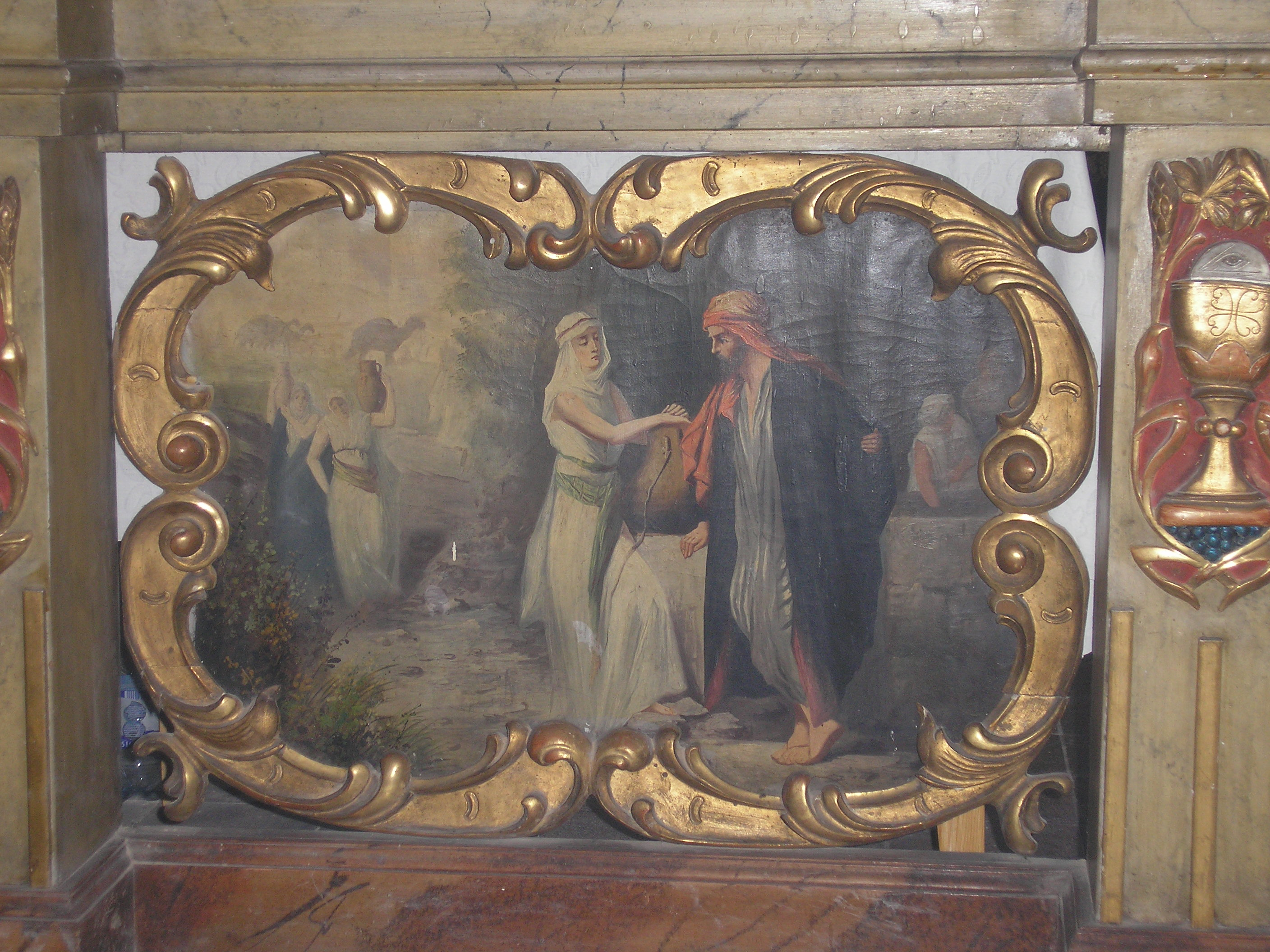 Jákob a kútnál (Szerb ortodox templom, Szeged-Szőreg, Magyarország)